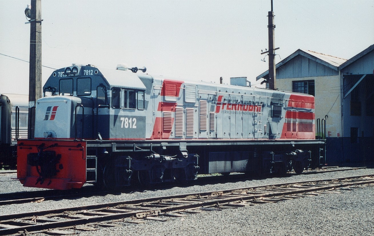 FERROBAN 7812, GE U20C Triagem Pta-Bauru-SP-Brasil